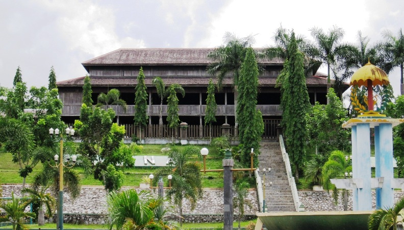 Istana Kuning, tempat kedudukan Sultan Kutawaringin di Pangkalanbuun. Bangunan ini adalah replika hasil restorasi setelah terjadi kebakaran yang menghanguskan bangunan asli.